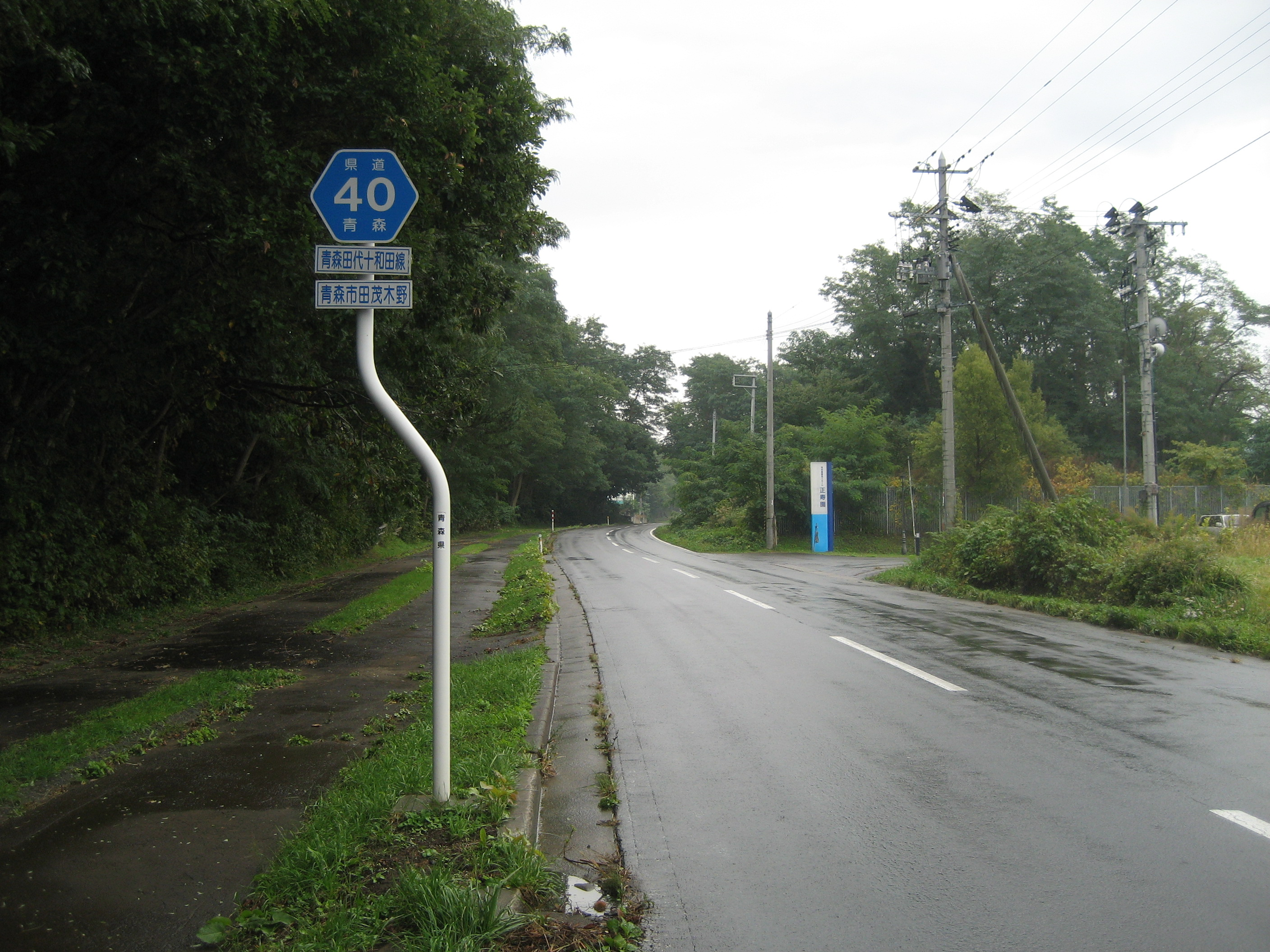 青森県道40号線青森市茂木野付近